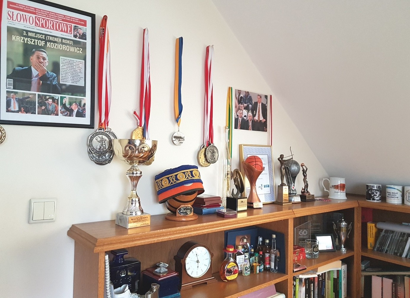 Krzysztof Koziorowicz - Pamiątki (2018)